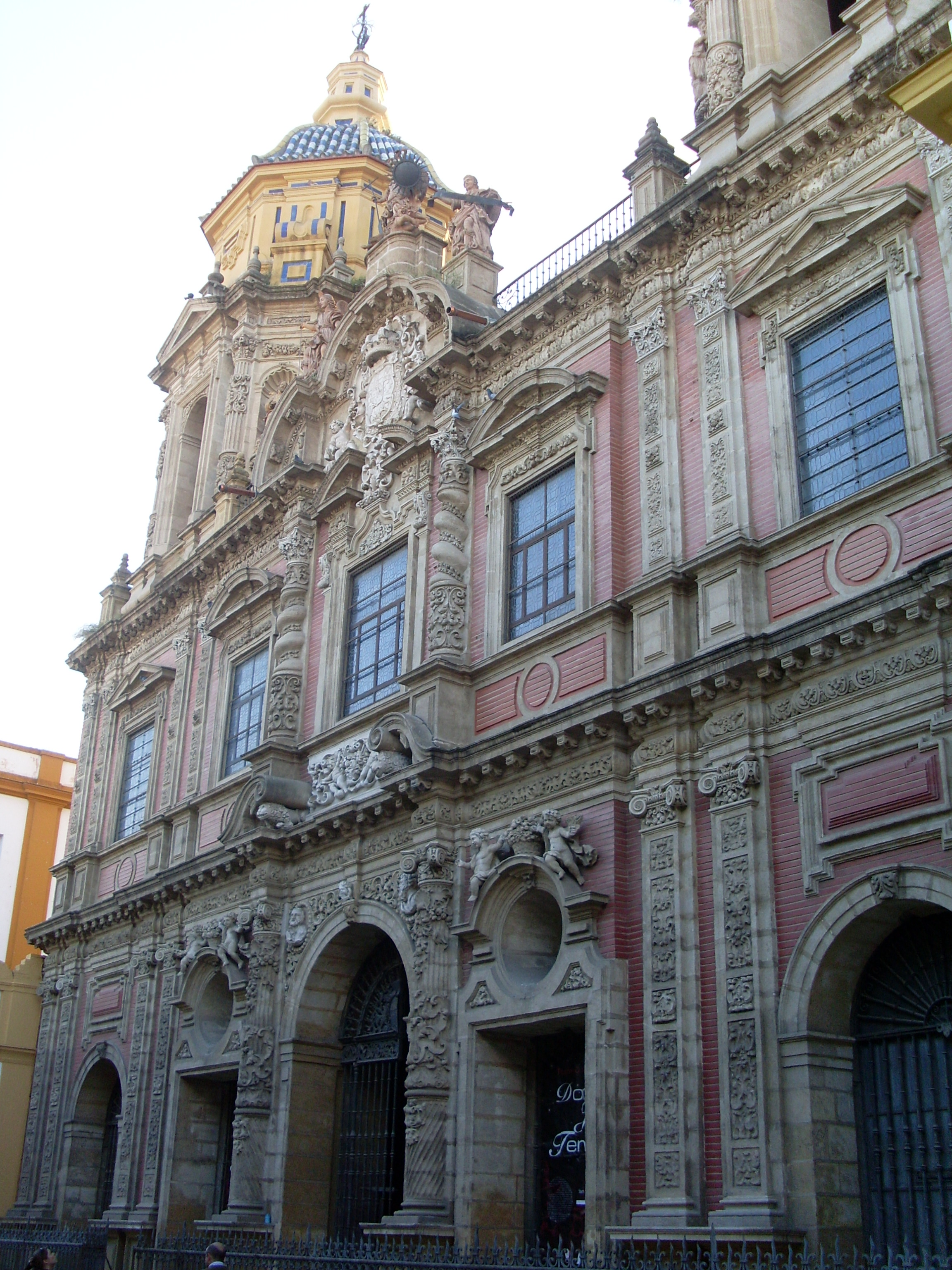 Fachada de la Iglesia de San Luis de los Franceses (Sevilla).